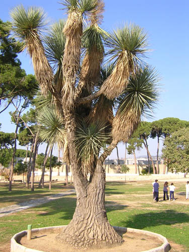 El Canelobre (candelabro), la nolina del Parque de Can Solei y Ca l'Arnús.